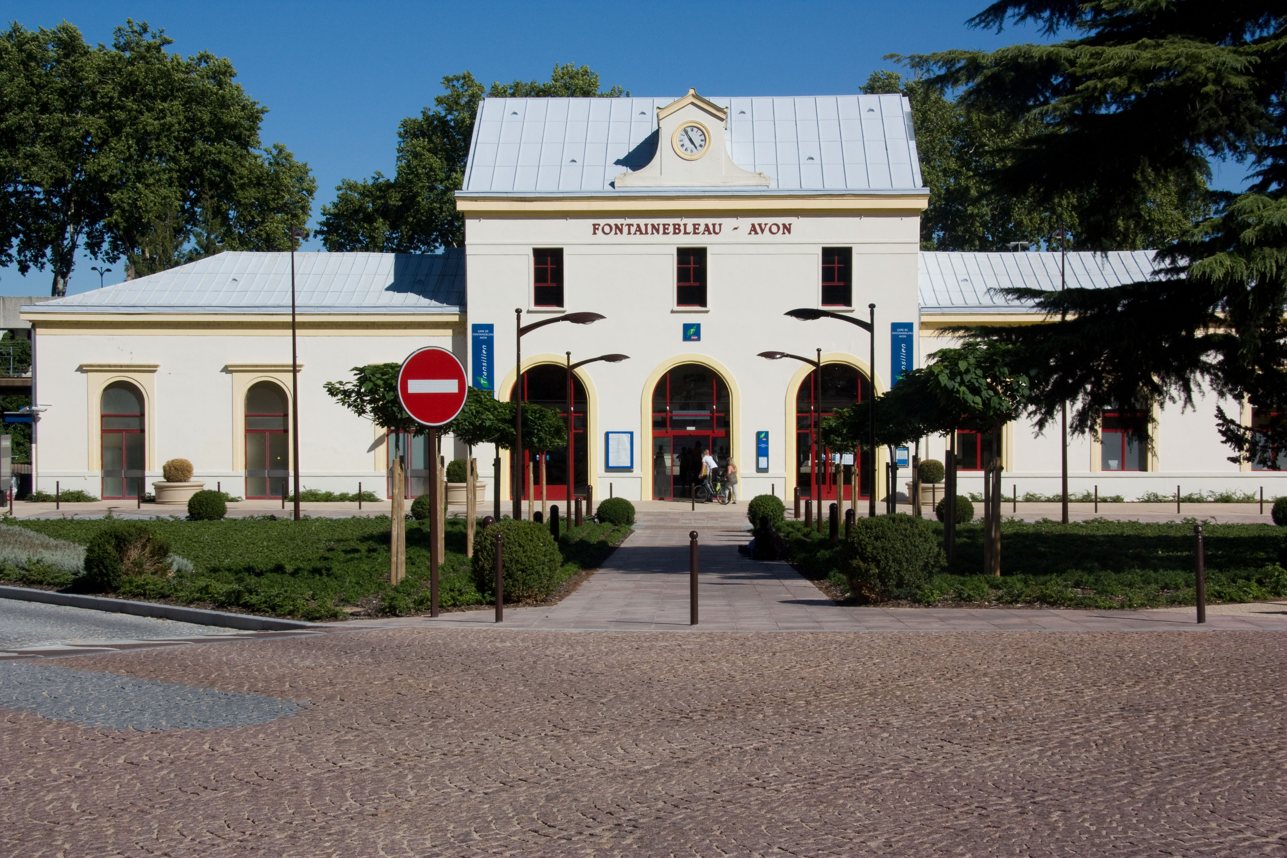 Gare de Fontainebleau - Avon, Avon, Seine-et-Marne, France